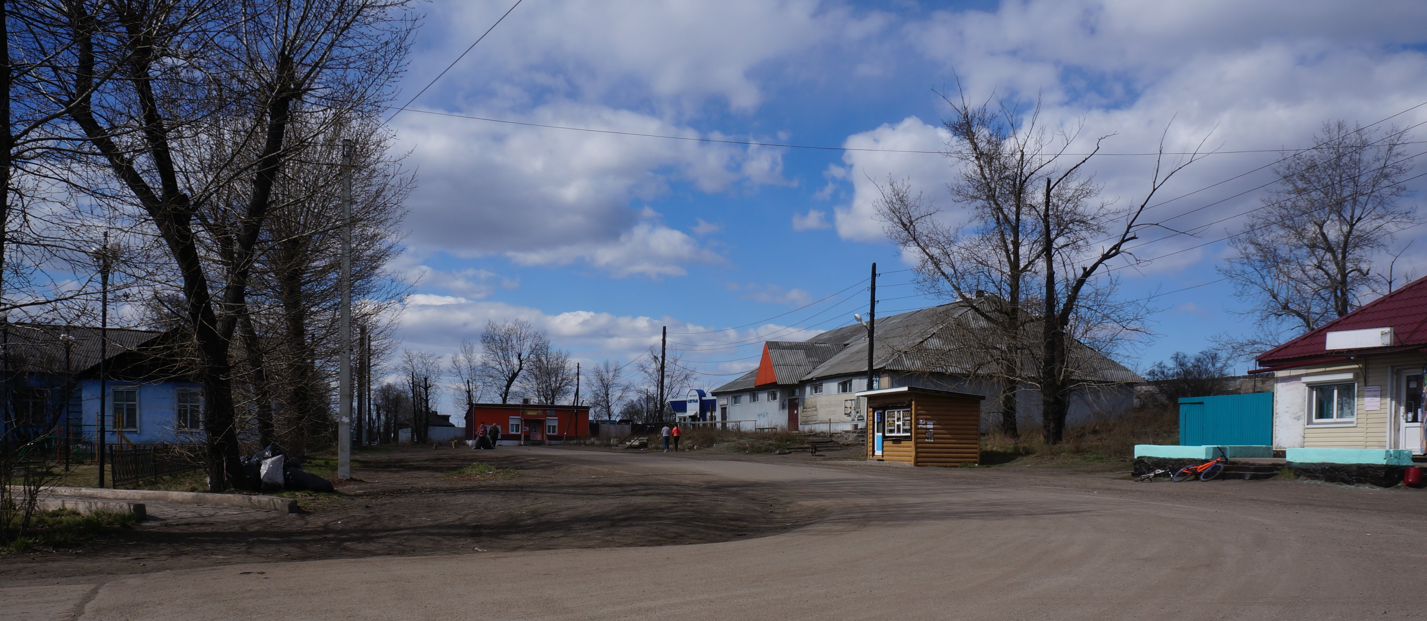 Вид площади с библиотекой и магазинами